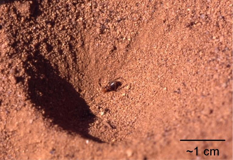 Antlion trap with left-overs form last meal (ant abdomen) Location: Nordost-Niedersachsen (Germany) Keywords: Myrmeleontidae --- nl: Valkuil van (één of andere soort) mierenleeuw. De resten van de laatste maaltijd liggen er nog (halve mier). de: Fangtrichter eines Ameisenlöwen im Sandboden. Man erkennt noch die Reste der letzten Mahlzeit (Hinterleib einer Ameise) Ort: Nordost-Niedersachsen (Deutschland)